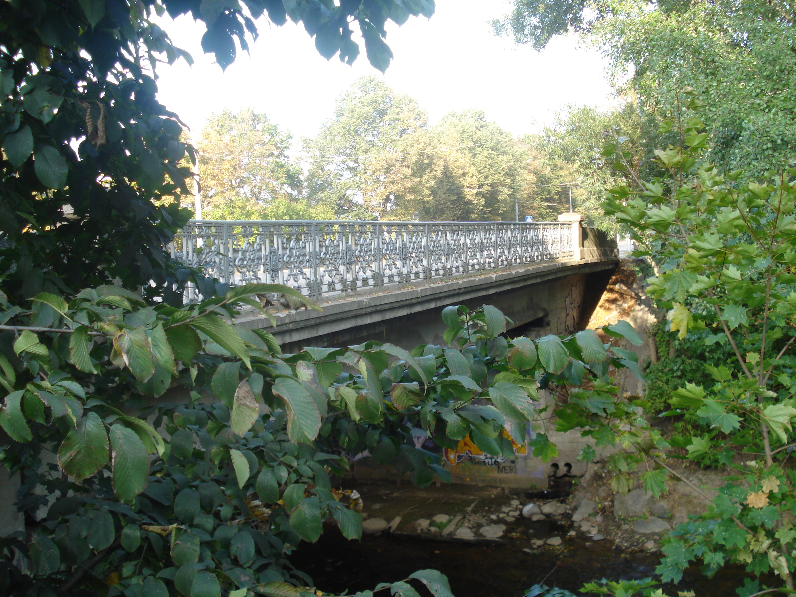 Castle bridge (Pilies tiltas) over Vilnia river in Vilnius